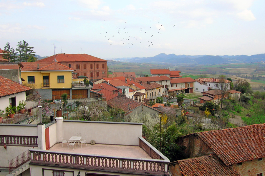 Panorama di Gabiano (AL) dal piazzale-belvedere antistante il municipio